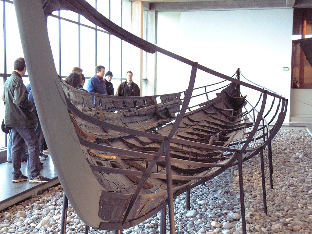 Skuldelev V: Ein wikingerzeitliches, kleineres Kriegsschiff, das im Roskilde-Fjord in der Nähe von Skuldelev gefunden wurde.